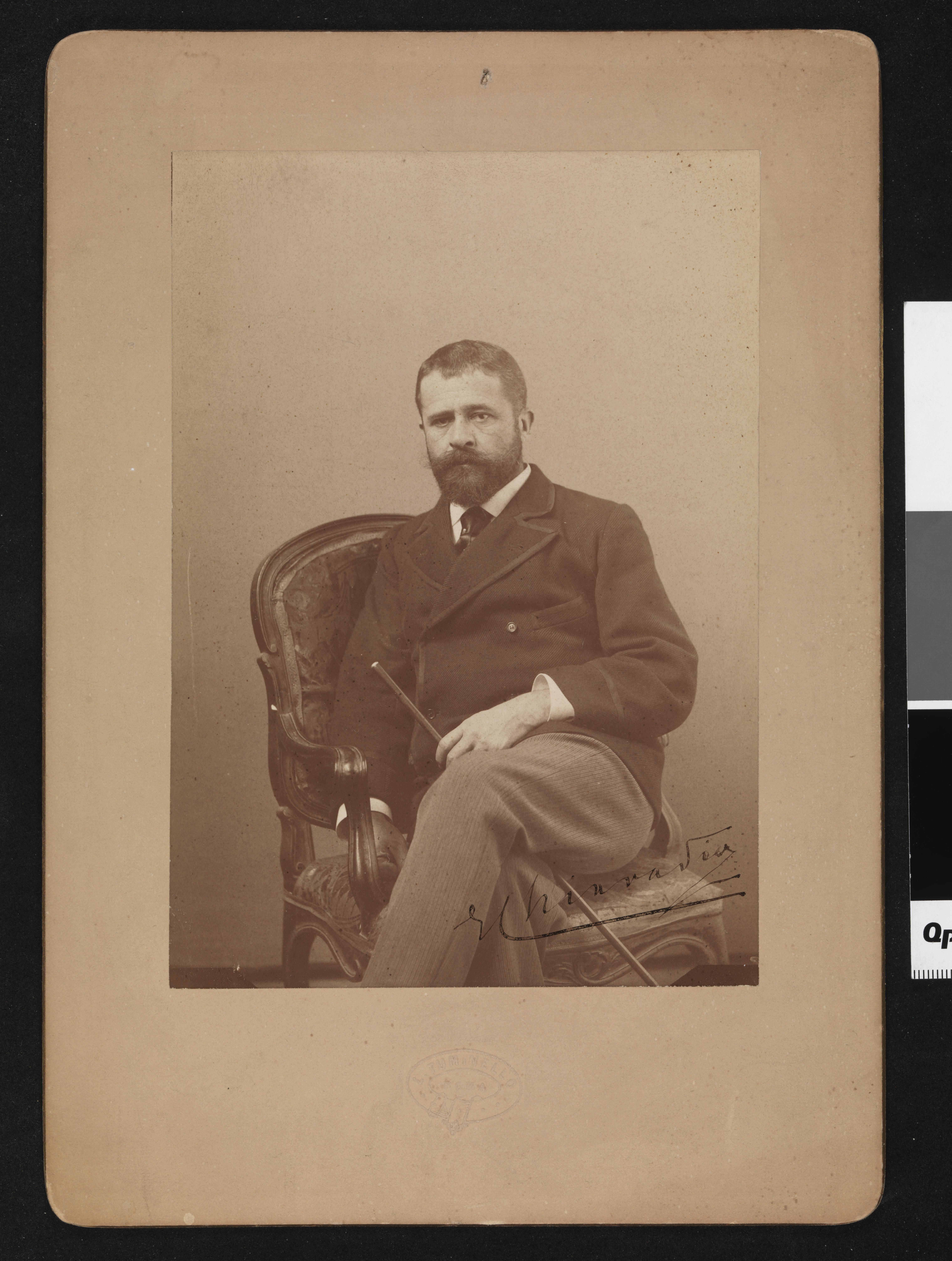 Bildet er hentet fra Nasjonalbibliotekets bildesamling Depicted person: Chiaradia, Enrico